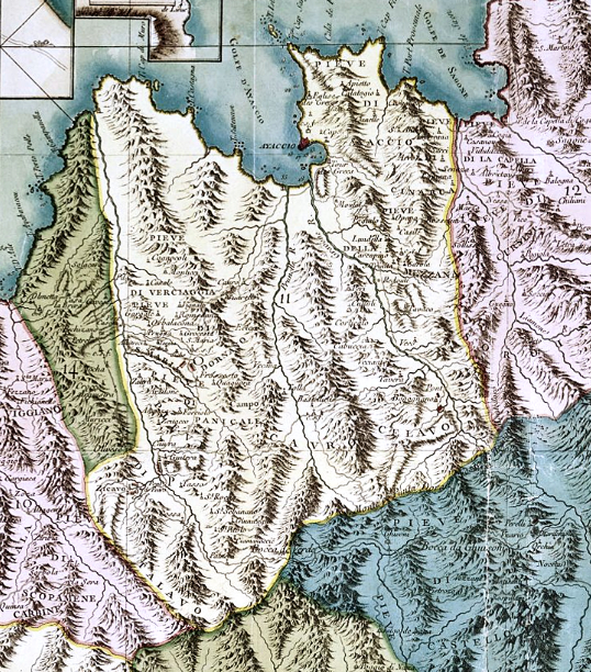 Piève d'Ajaccio (Extrait de la carte militaire concernant la Plaine orientale de Corse, en 1768 - Sont marquées toutes les paroisses et tous les principaux hameaux de chaque pieve / rectifiée en l'année 1740, suivant les ordres de Monsieur le marquis de Maillebois)